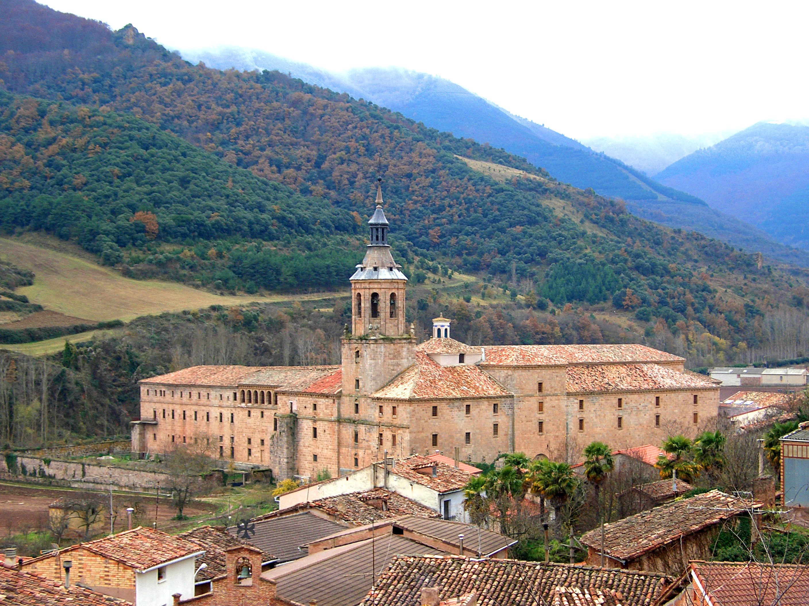 Monestir de San Millán de Yuso